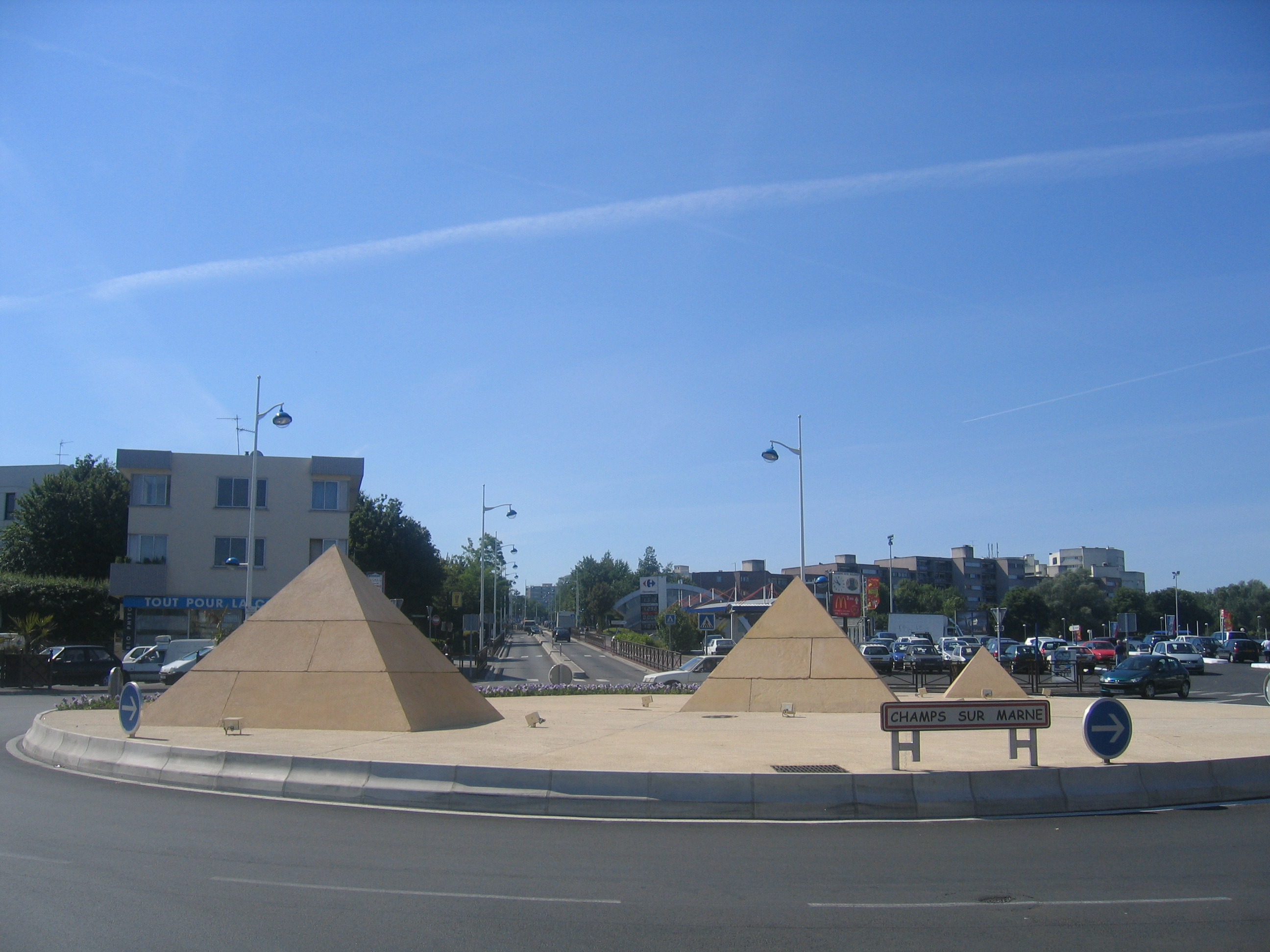 Le quartier des Pyramides, Champs-sur-Marne, France.